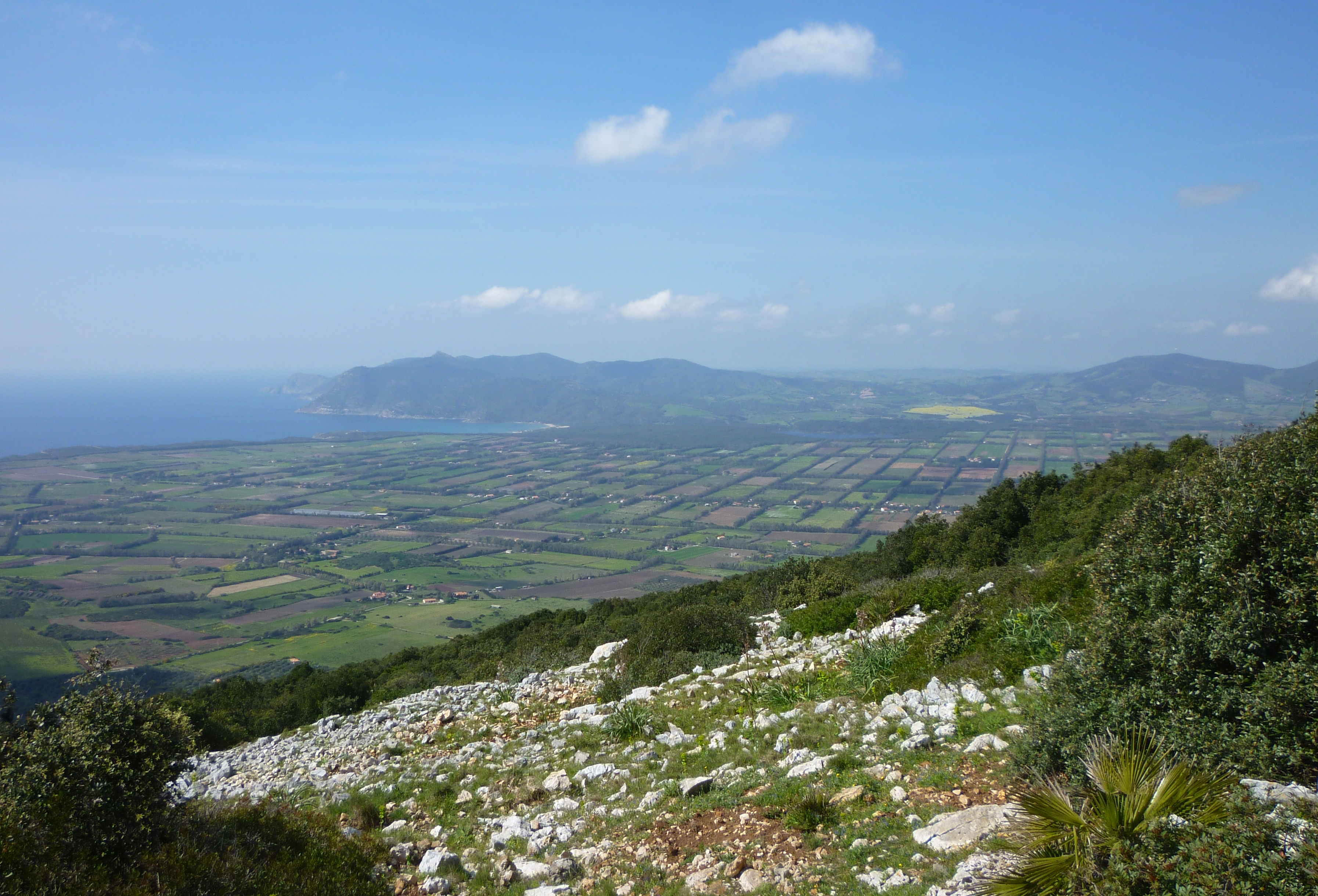 Porto Ferro e Lago di Bararz da Monte Doglia, Alghero (SS)